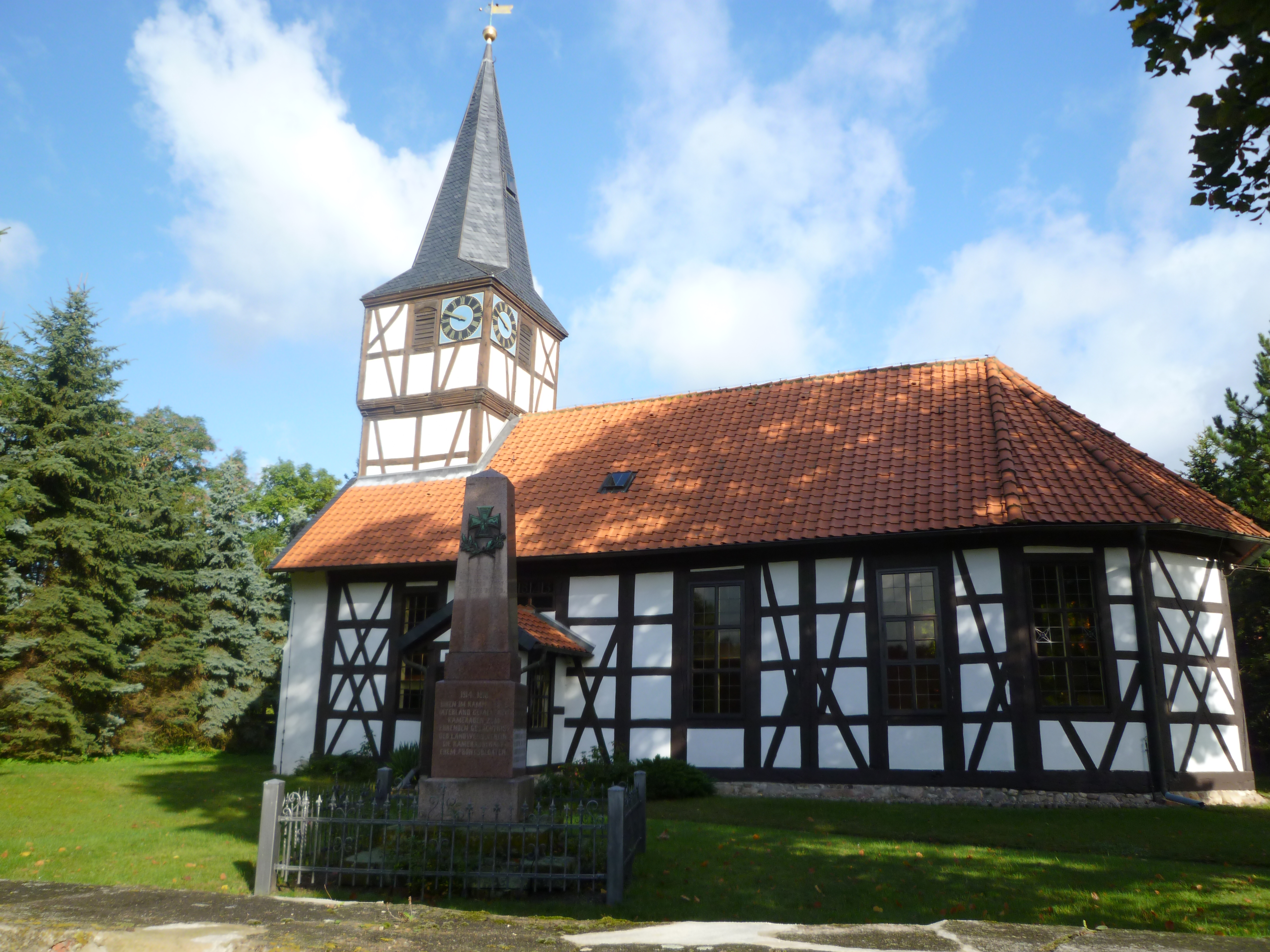 Ortskirche Zobbenitz mit Kriegerdenkmal